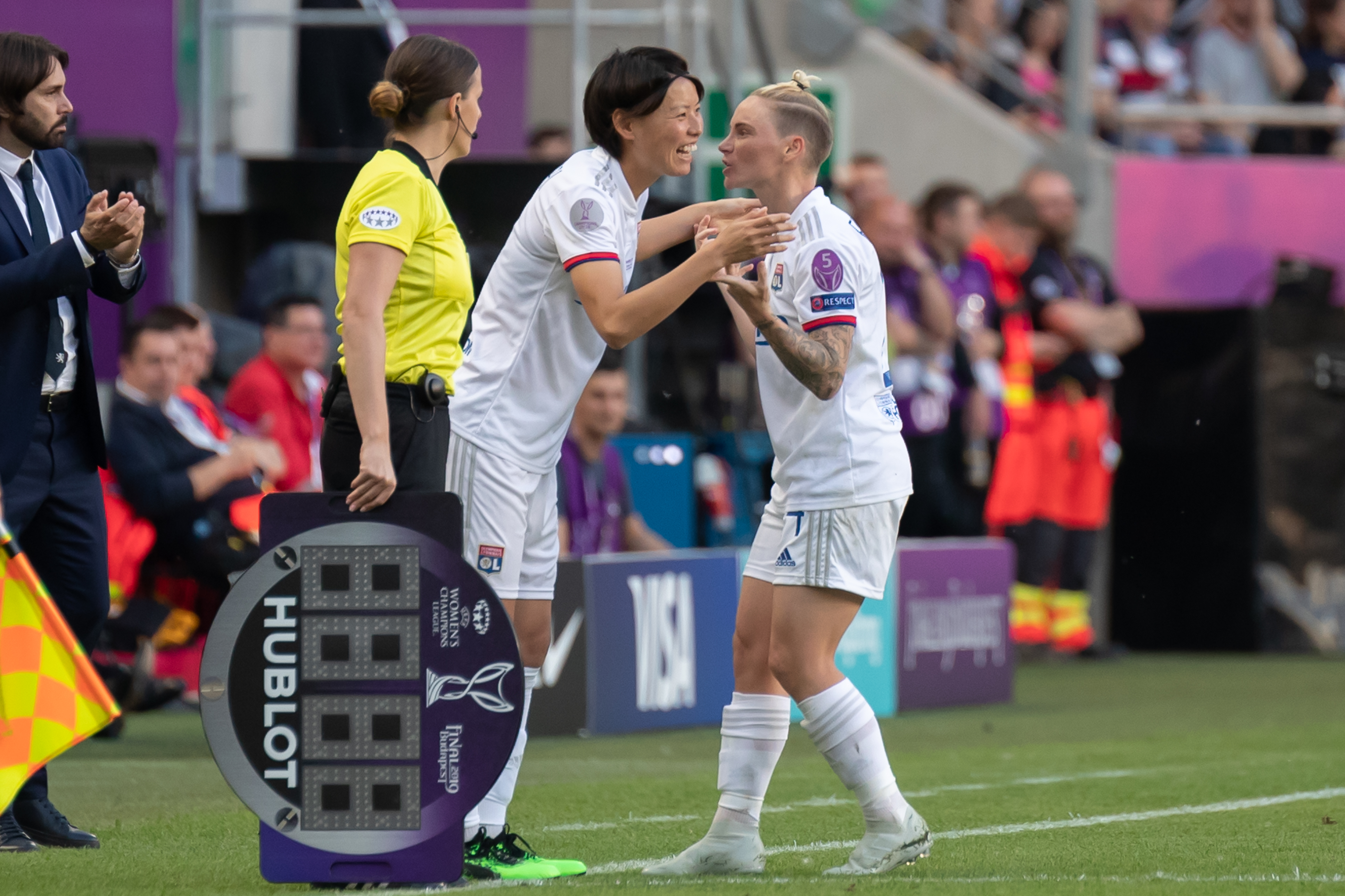 Fußball, Frauen, UEFA Women's Champions League, Olympique Lyonnais - FC Barcelona; Wechsel bei Olympique Lyonnais: Saki Kumagai (Olympique Lyon, 5) kommt für Jessica Fishlock (Olympique Lyon, 24)